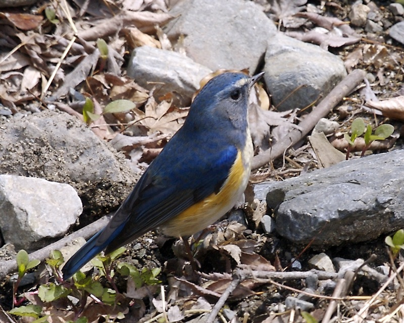 Orange-flanked Bush Robin Tarsiger cyanurus - adult male. Minoo, Osaka, Japan.